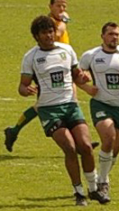 Finałowy mecz ekstraligi Rugby sezonu 2009/2010 pomiędzy Budowlanymi Łódź a Lechią Gdańsk Personality rights warningAlthough this work is freely licensed or in the public domain, the person(s) shown may have rights that legally restrict certain re-uses unless those depicted consent to such uses. In these cases, a model release or other evidence of consent could protect you from infringement claims.